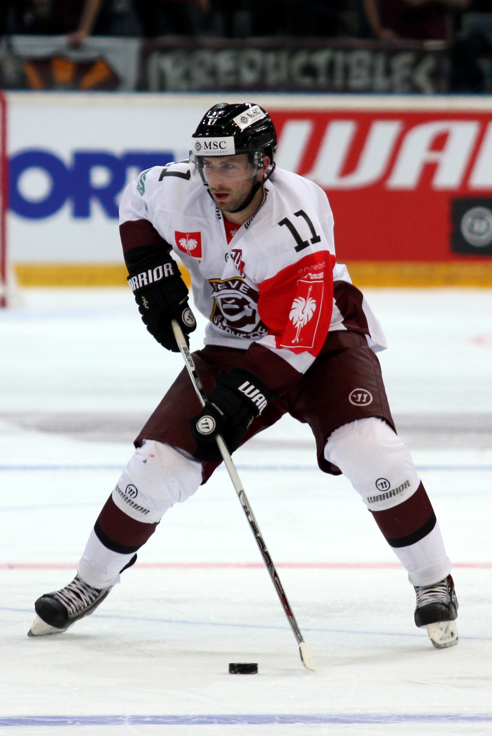 Tom Pyatt (G 11).